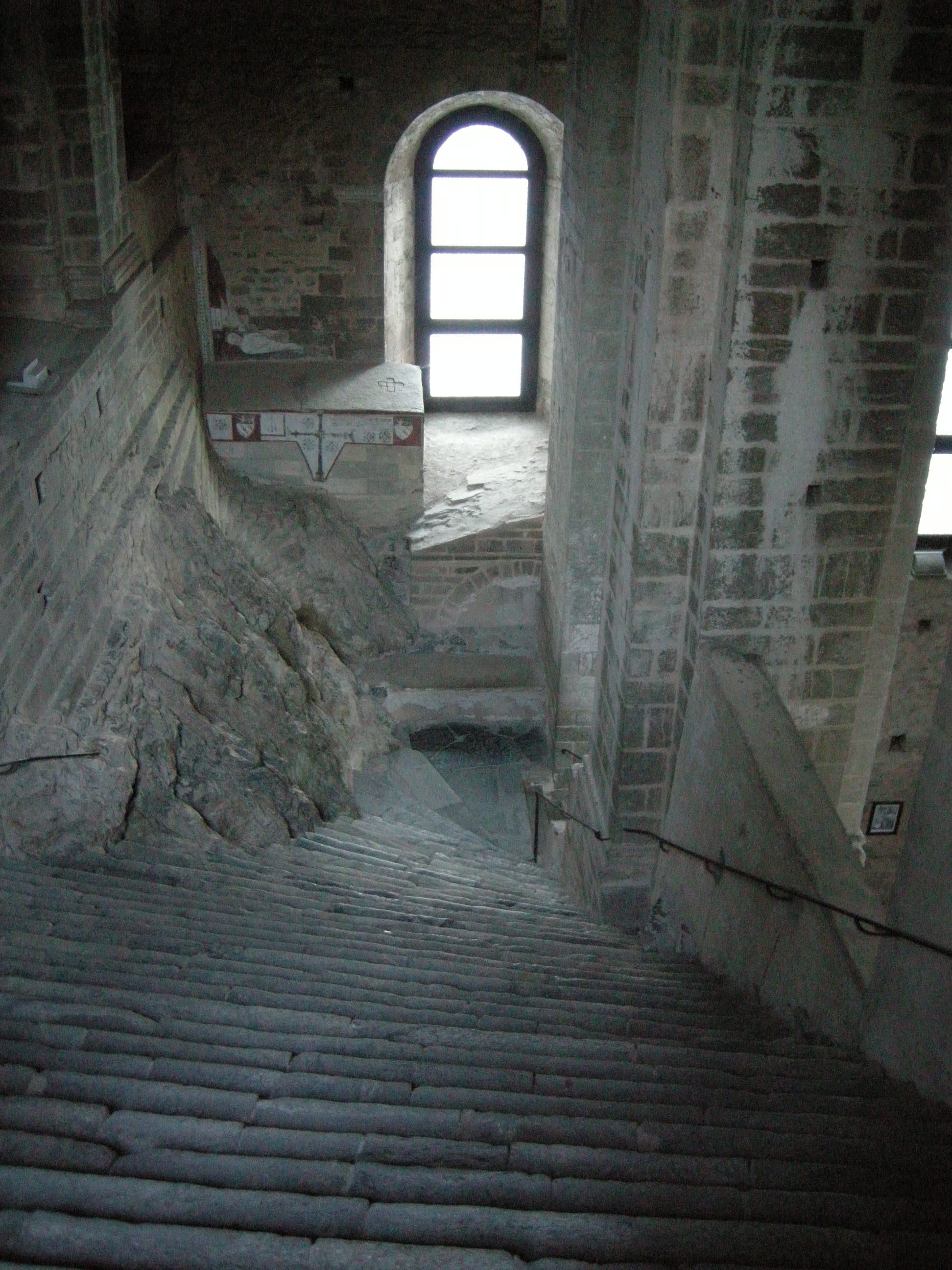 Sacra di san michele 05 scalinata